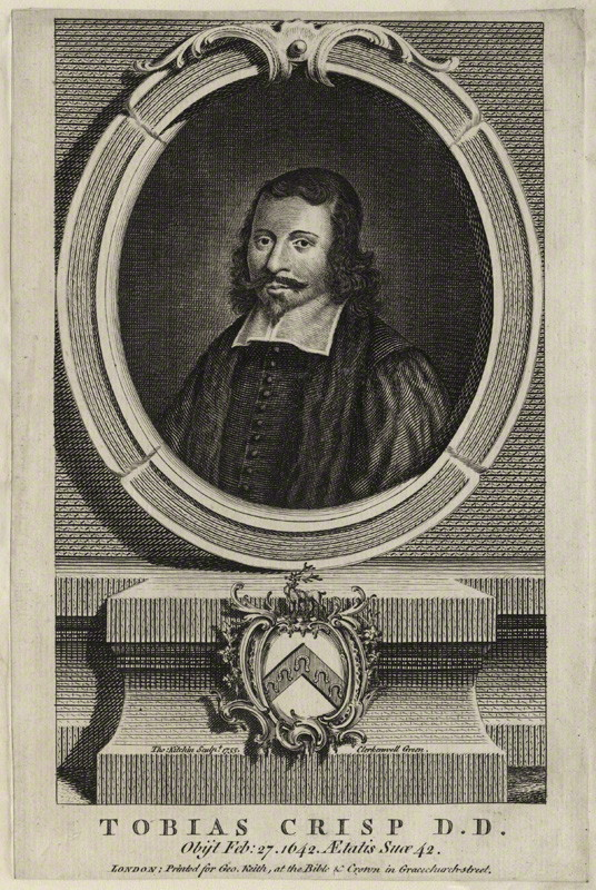 line engraving